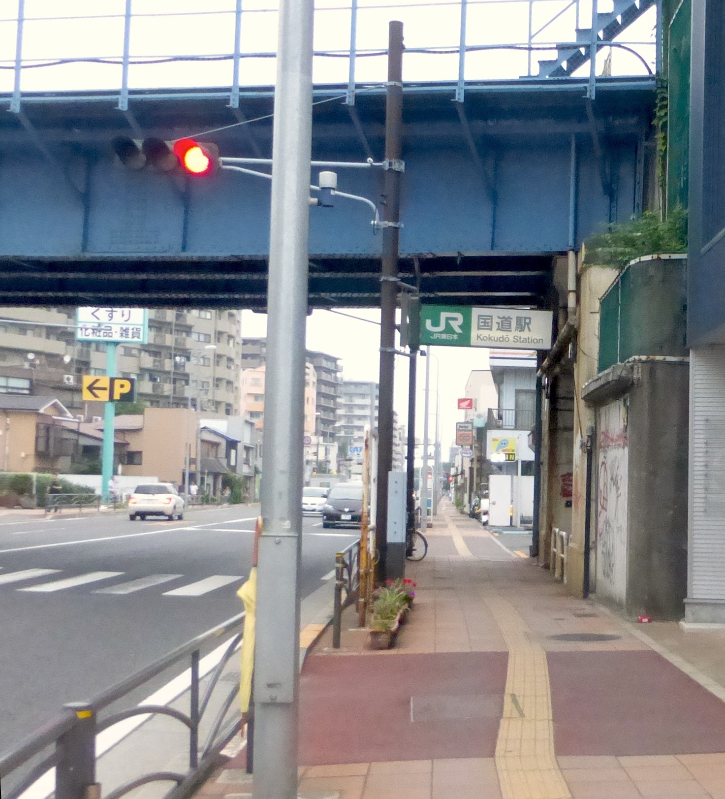 Kokudō Station exit/entrance (国道駅の出入り口)